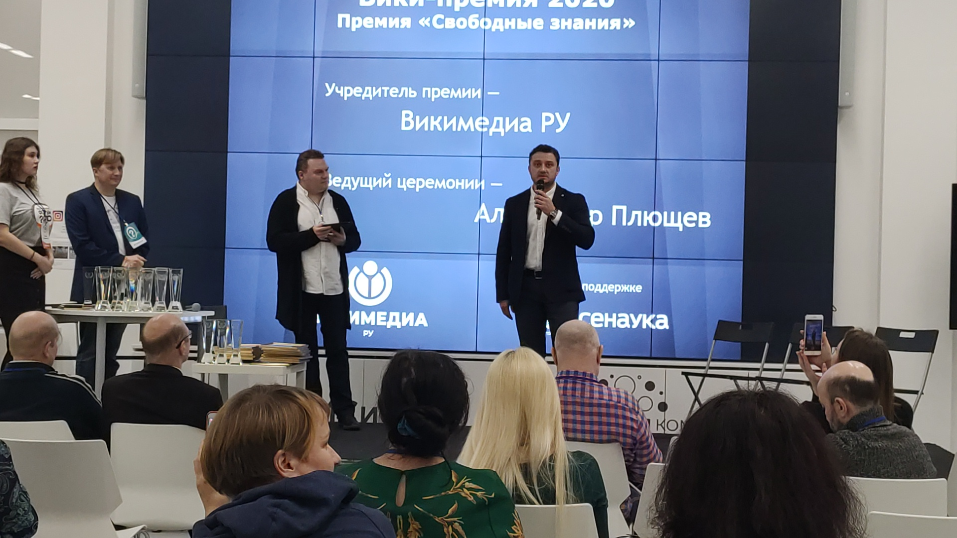 Приветственное слово партнёра Вики-Премии 2020 Дениса Евгеньевича Долженко, депутата Законодательного собрания Вологодской области. Вручение вики-премий по итогам 2019 года. Саха тыла: 2019 сыл түмүгүнэн Арассыыйа Биики Бириэмийэлэрин туттарыы